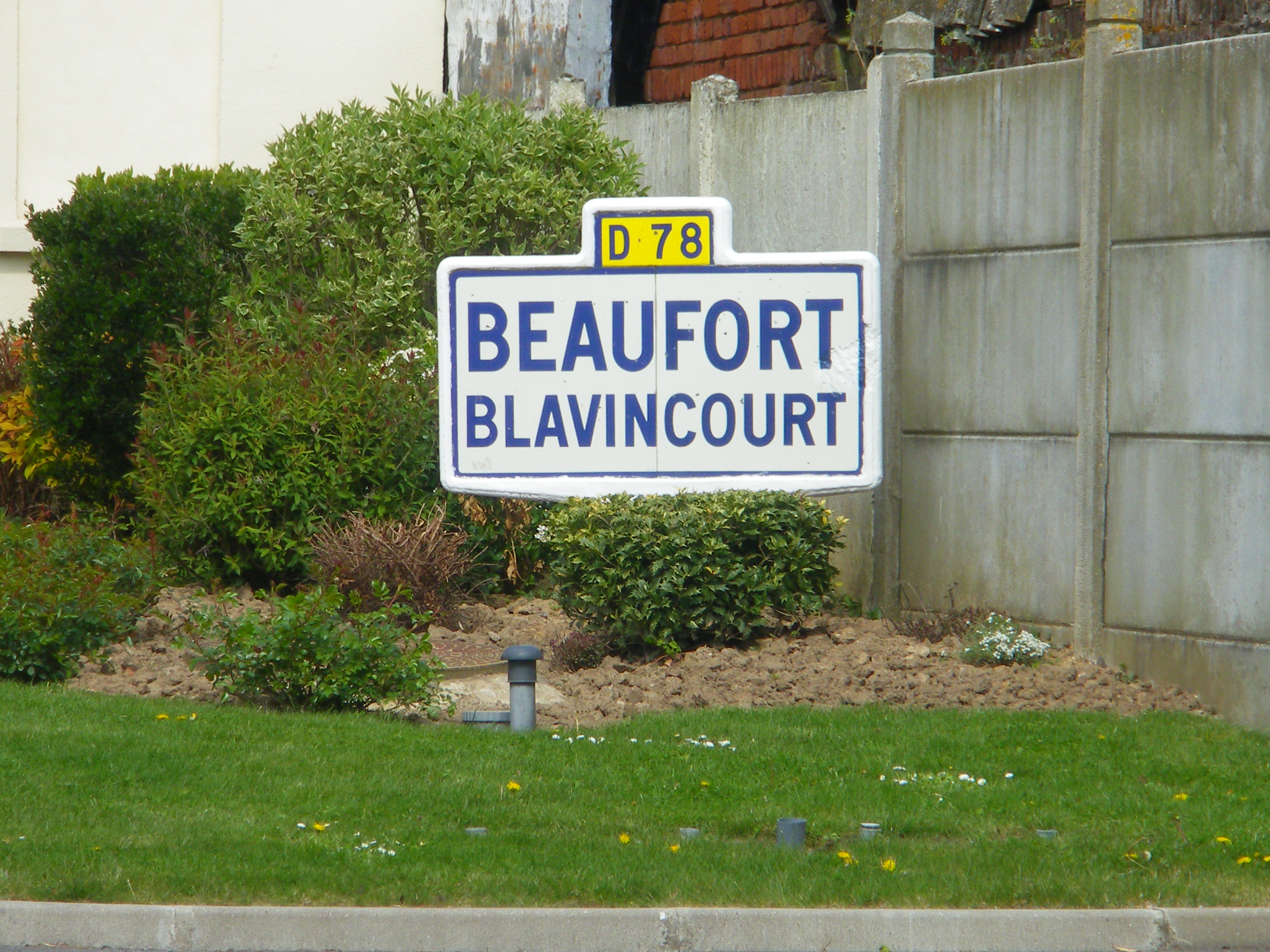 Vue d'un ancien panneau d'entrée de la commune de Beaufort-Blavincourt, situé près de l'école.